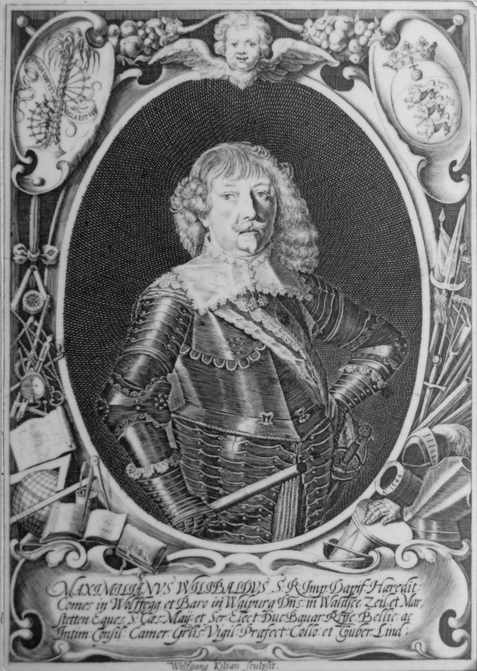 Maximilian Willibald von Waldburg-Wolfegg (Haus Waldburg); Kupferstich von Wolfgang Kilian; Darstellung nach der Ausstellung auf Burg Waldburg